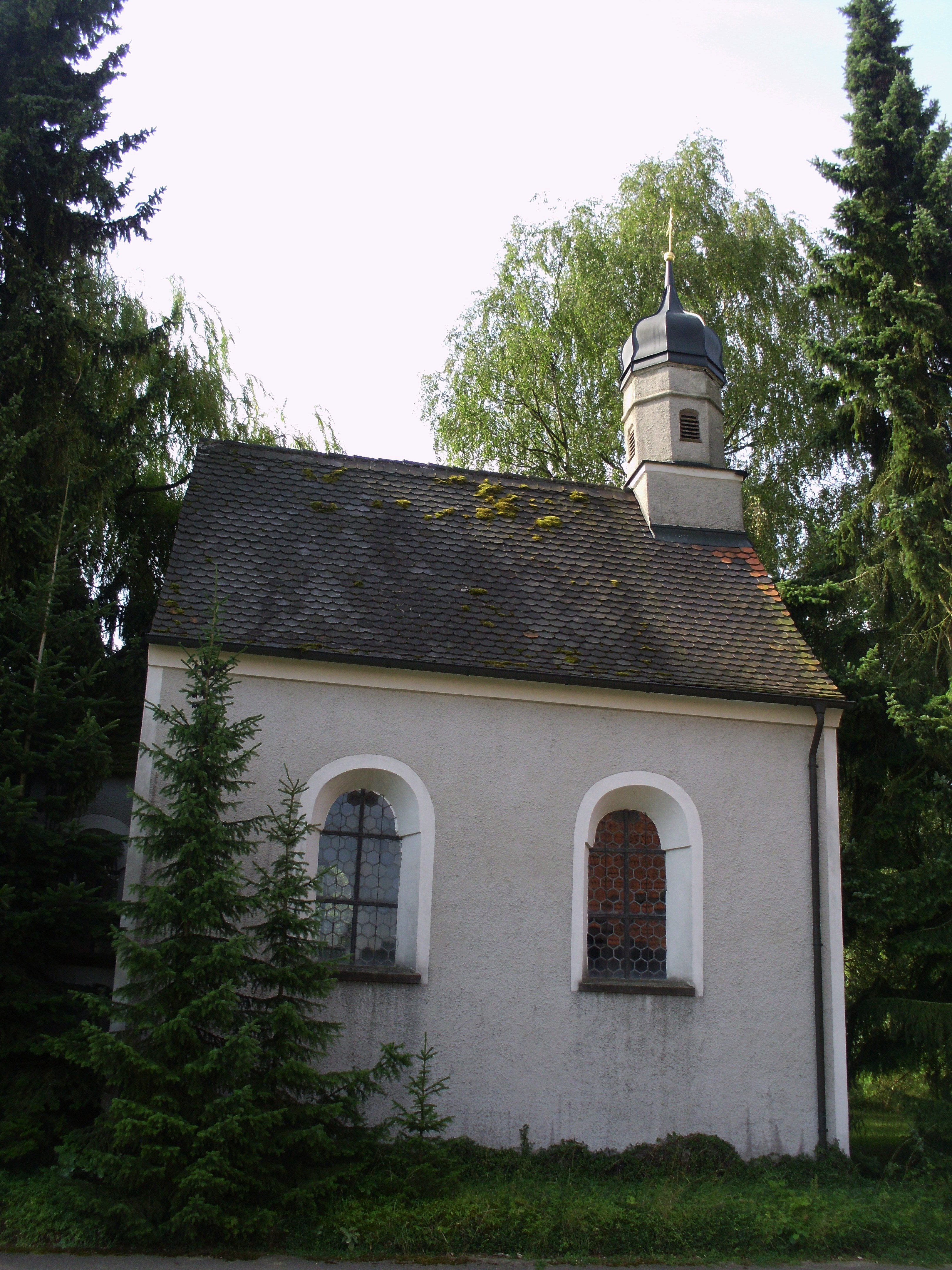 Siglohe, Ortsteil von Rennertshofen im Landkreis Neuburg-Schrobenhausen, Marienkapelle